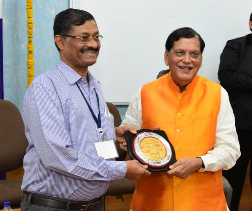 ಕನ್ನಡ: ವೈ ರವೀಂದ್ರನಾಥ್ ಡಾ. ಬಿಂದೇಶ್ವರ್ ಪಾಠಕ್ ರವರಿಂದ ೨೦೧೮ರಲ್ಲಿ ಸನ್ಮಾನಿತರಾಗಿರುವುದು